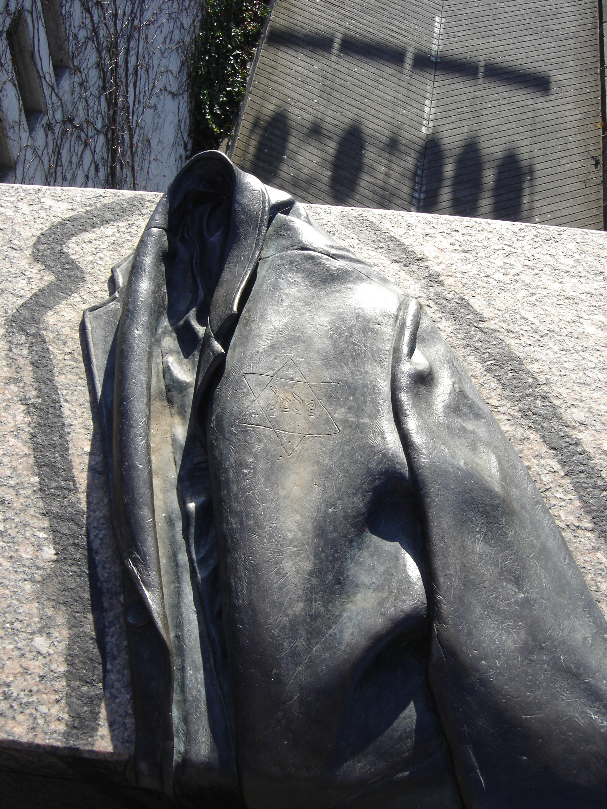 Das Denkmal für die nach Gurs deportierten Juden an der Freiburger Wiwilibrücke, von Birgit Stauch: Der vergessene Mantel, 2003